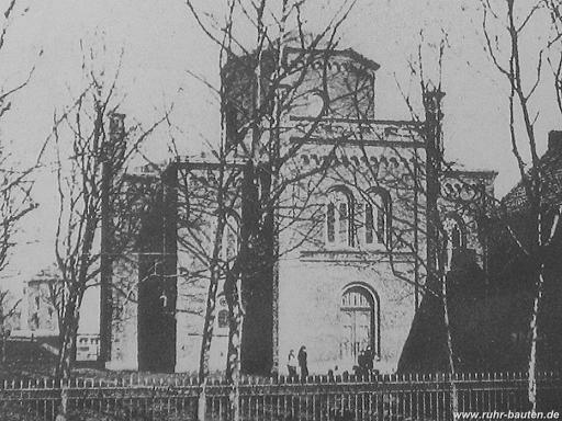 Synagoge in der Wilhelmstraße 18 in Bochum vor dem Umbau